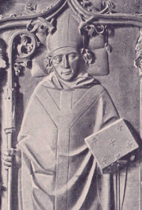 Berthold von Landsberg, Bischof von Verden 1470-1502, Bischof von Hildesheim 1481-1502, Bronzegrabplatte im Verdener Dom (Detail)